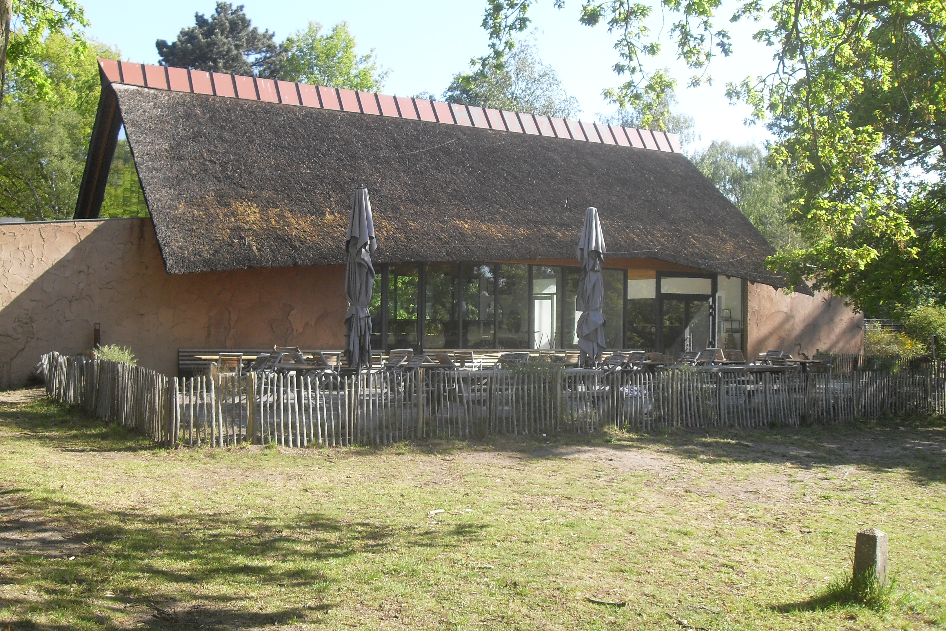 Paviljoen Heidezicht, in Bussum-Zuid